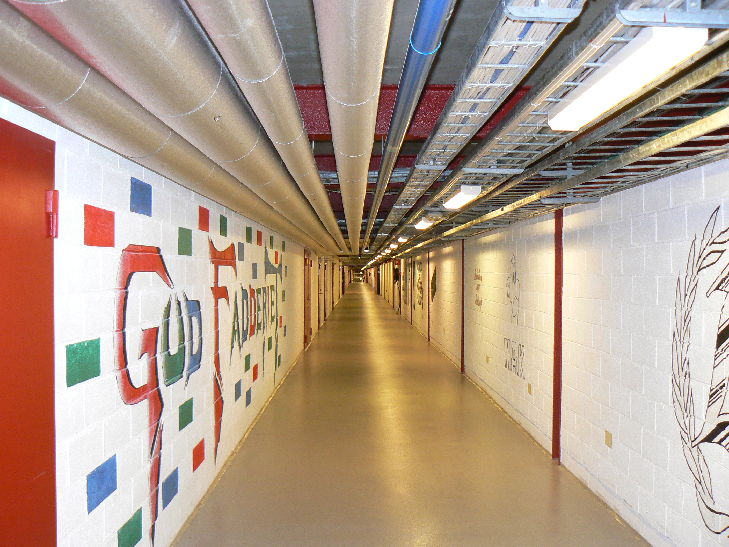 "Tankegången", underground corridor at Linköping University